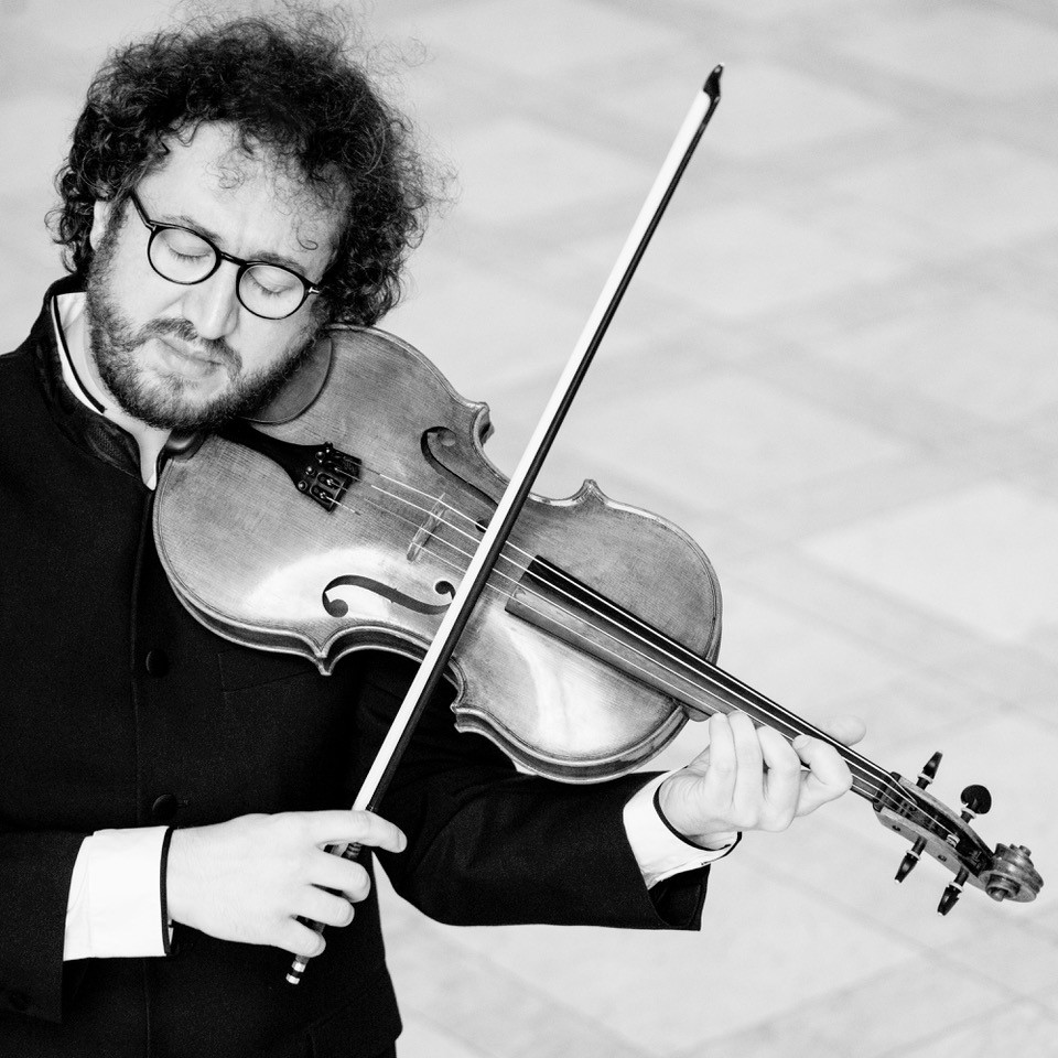 Der Musiker Atilla Aldemir mit seinem Instrument.